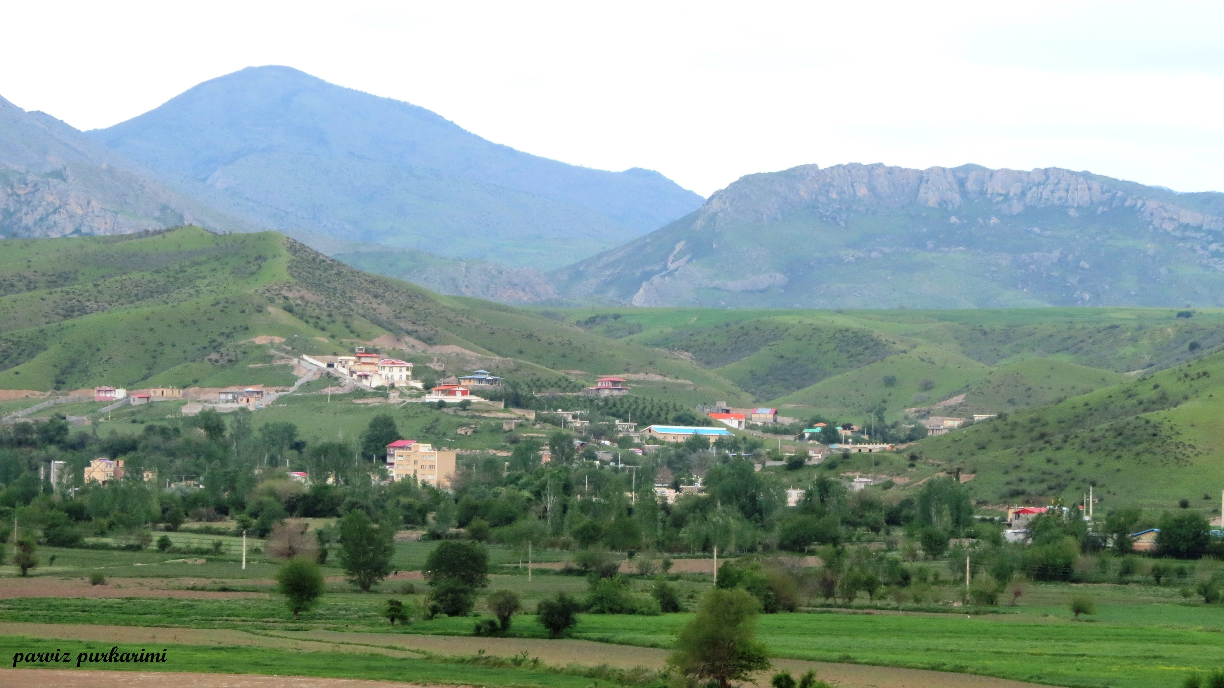 نمایی از ورودی شهر عاشقلو